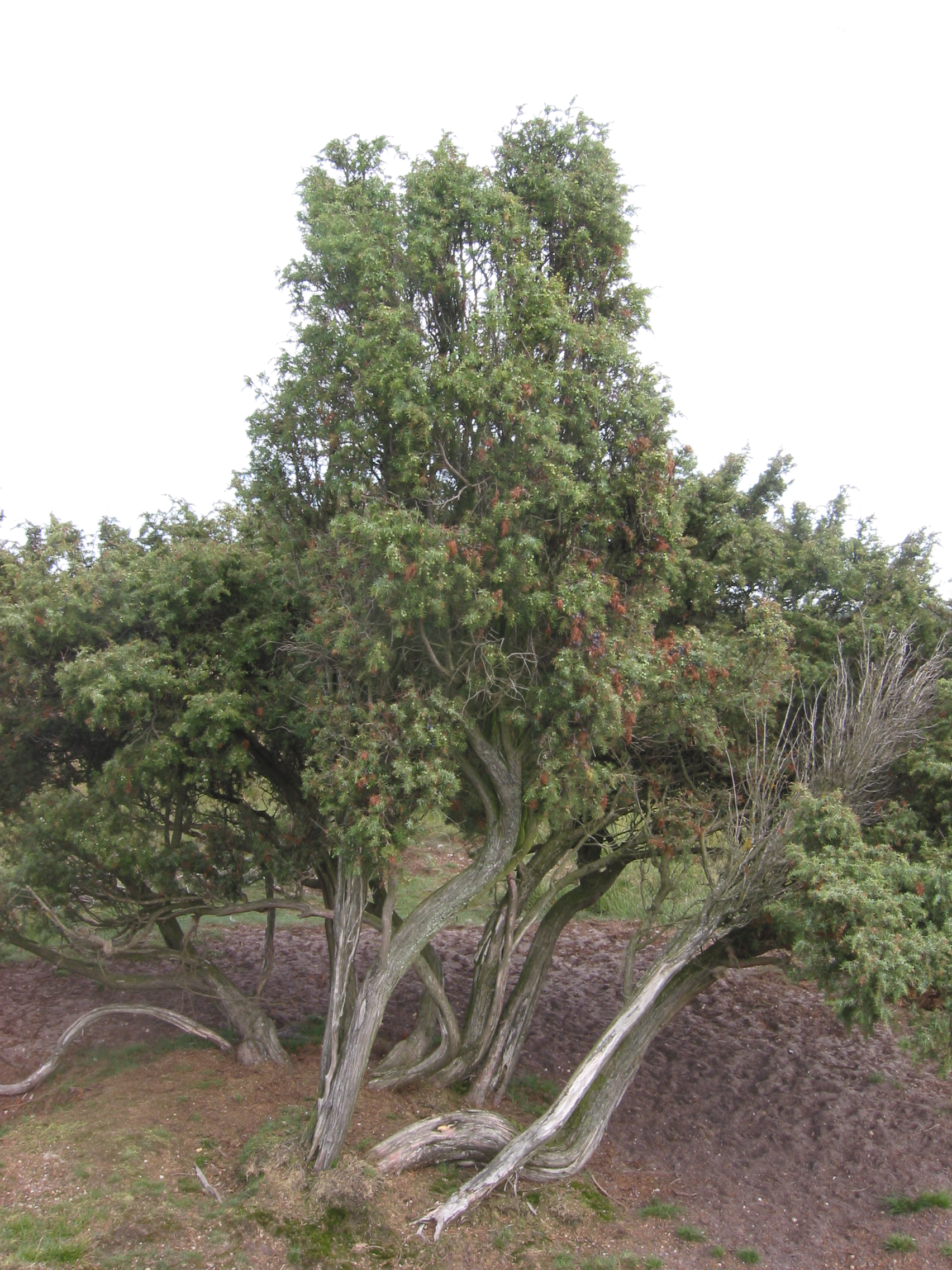 zelfgemaakte foto van Jeneverbes; half september Image:Jeneverbes.jpg Fil:Jeneverbes.jpg